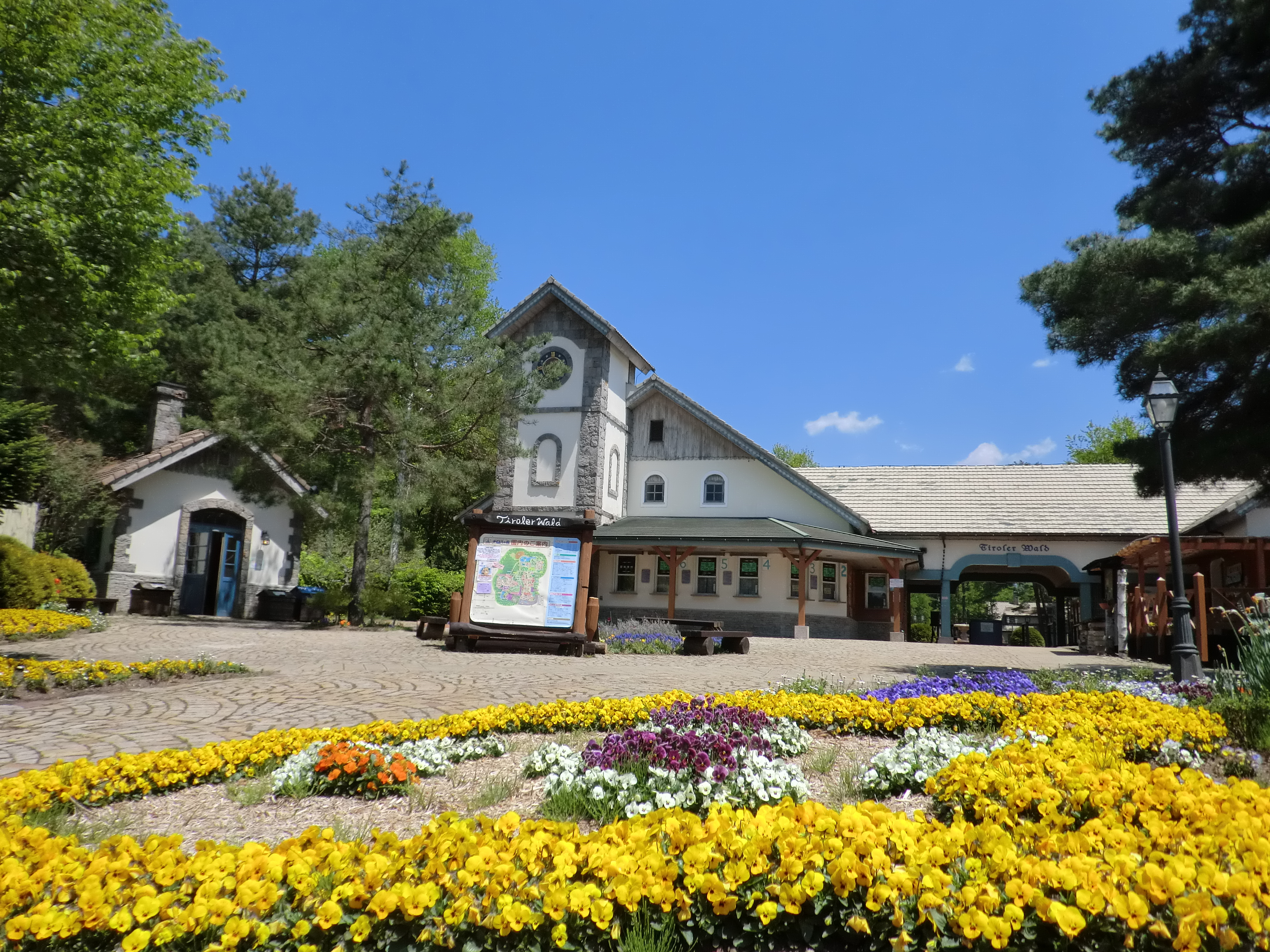 チロルのもり正面入口